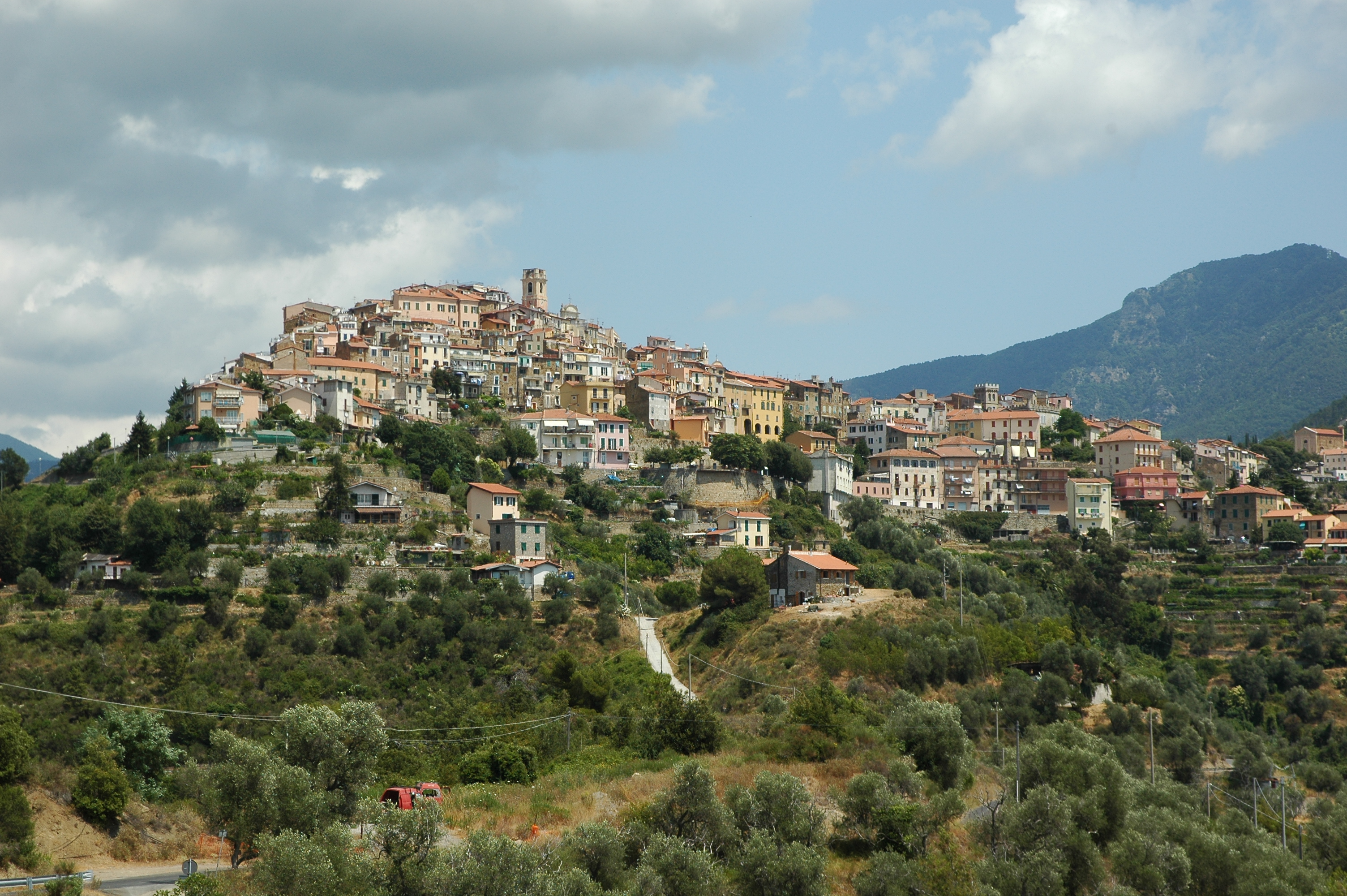 Veduta Comune di Perinaldo (IM) da sud